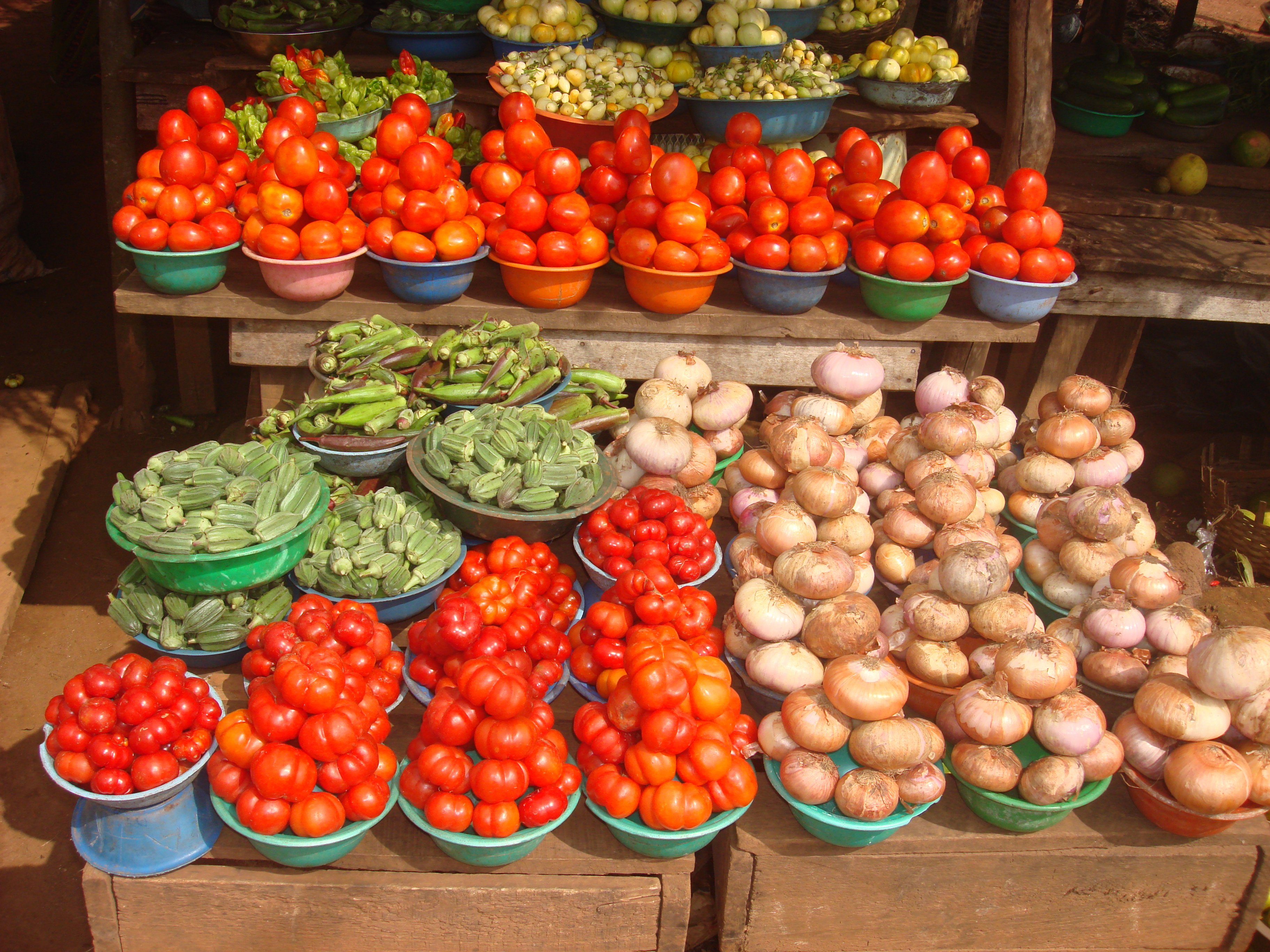 Marché de vivriers sur la route nationale Abidjan Abengourou, Côte d'Ivoire.